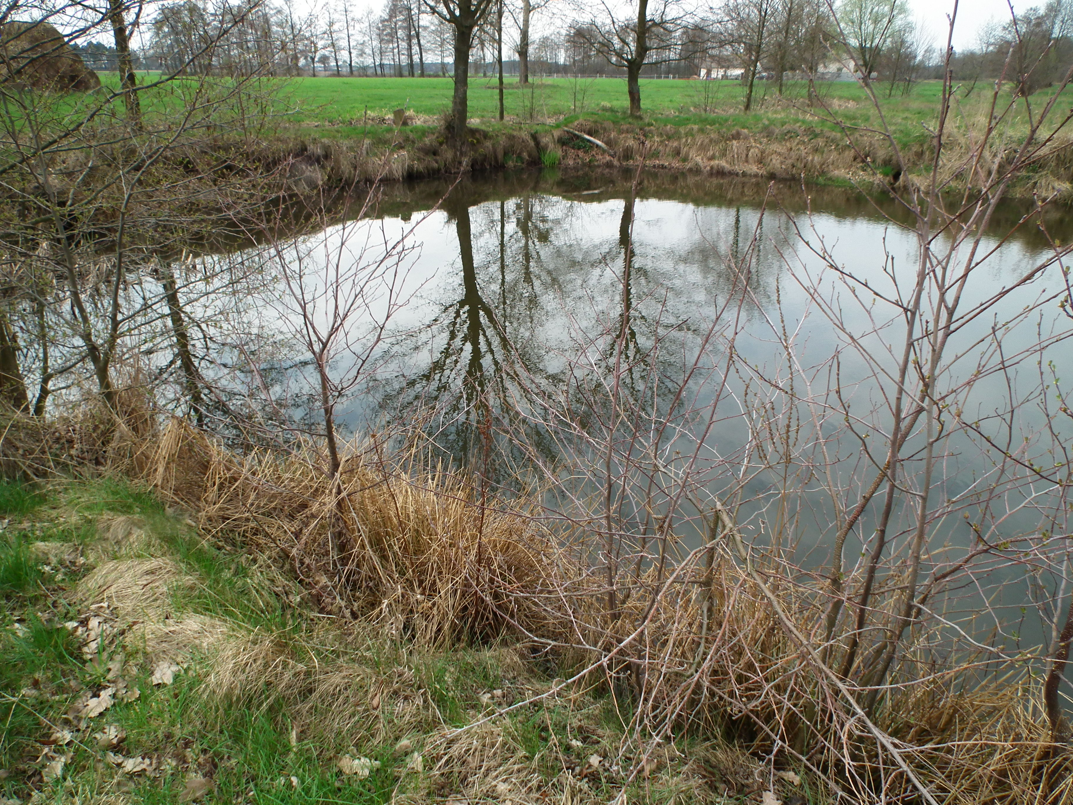 Odkrywka rudy darniowej w Wierzchach - Puszcza Pyzdrska.